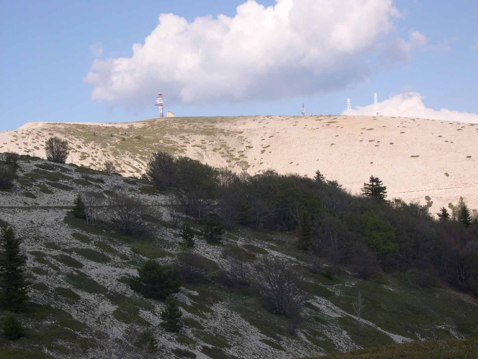 le Signal de Lure, point culminant de la montagne de Lure